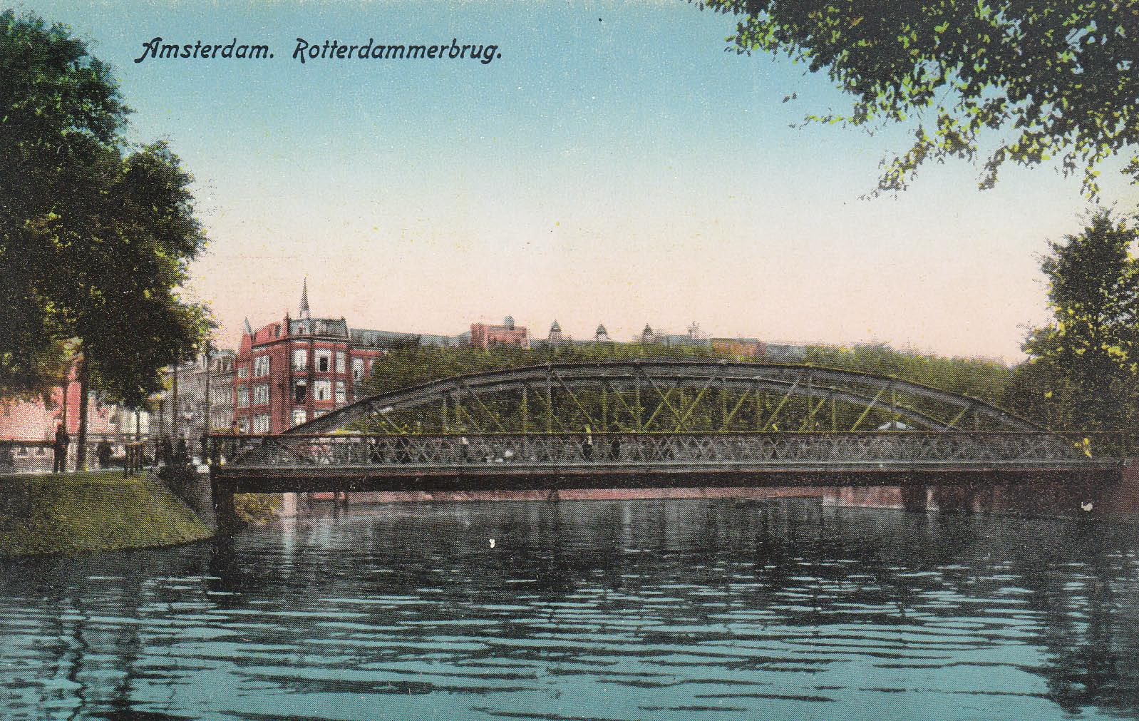 Nassaukade, Rotterdammerbrug (ansichtkaart, kleur).